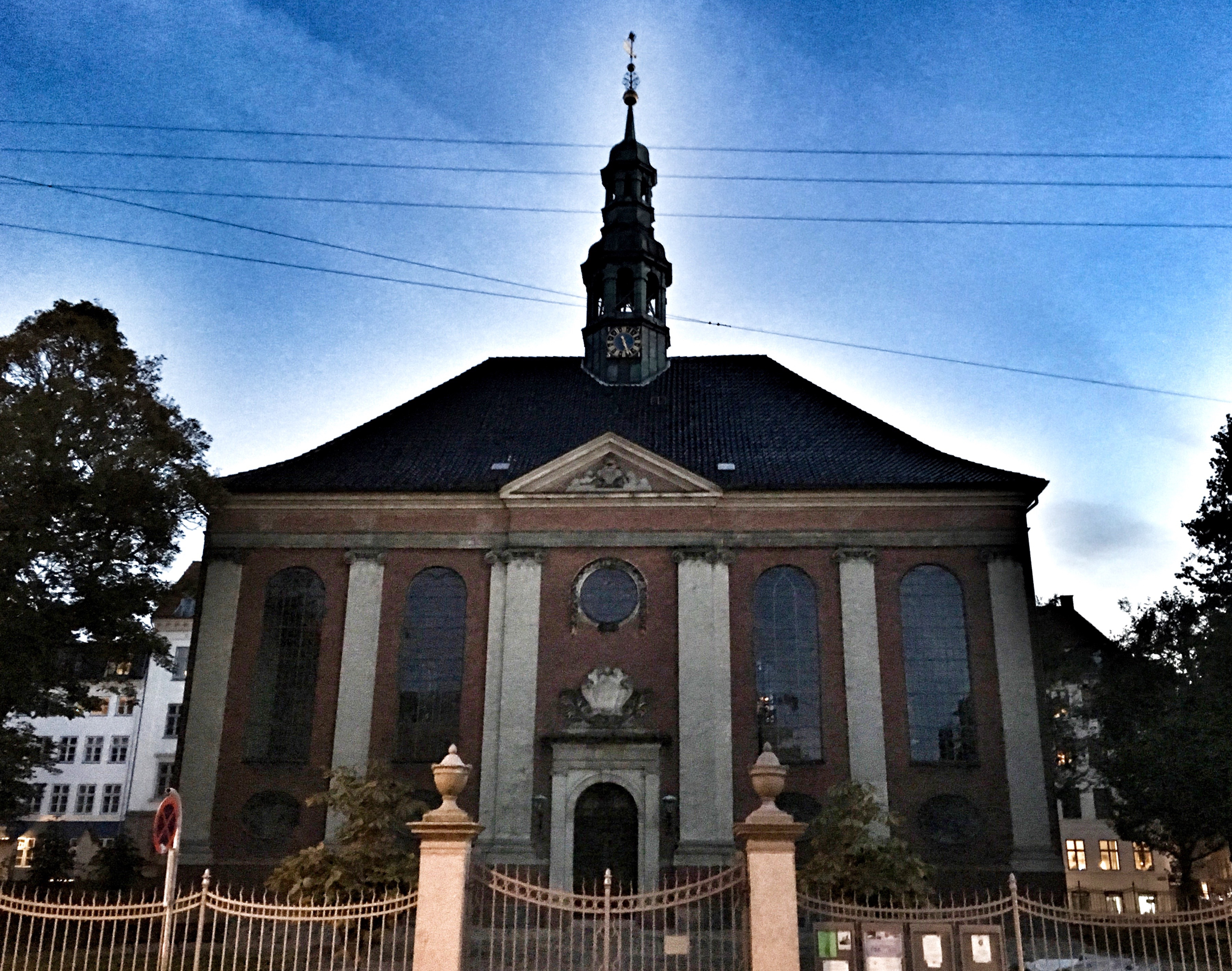 Reformert Kirke, København